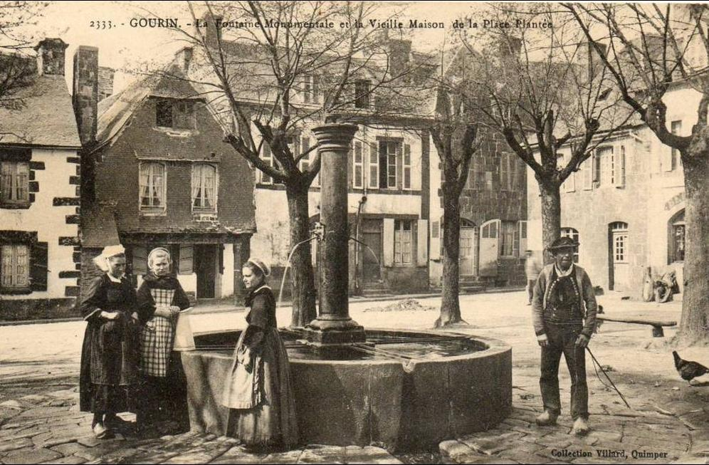 La place Stenfort à Gourin vers 1900 avec sa fontaine monumentale et la vieille maison à piliers (carte postale Villard).